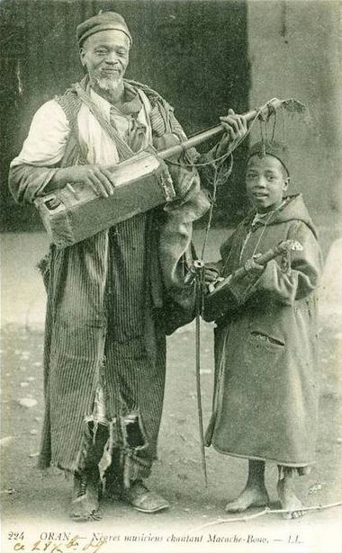 Photo ancienne représentant des gnaouas algériens dans les rues de la ville d'Oran.